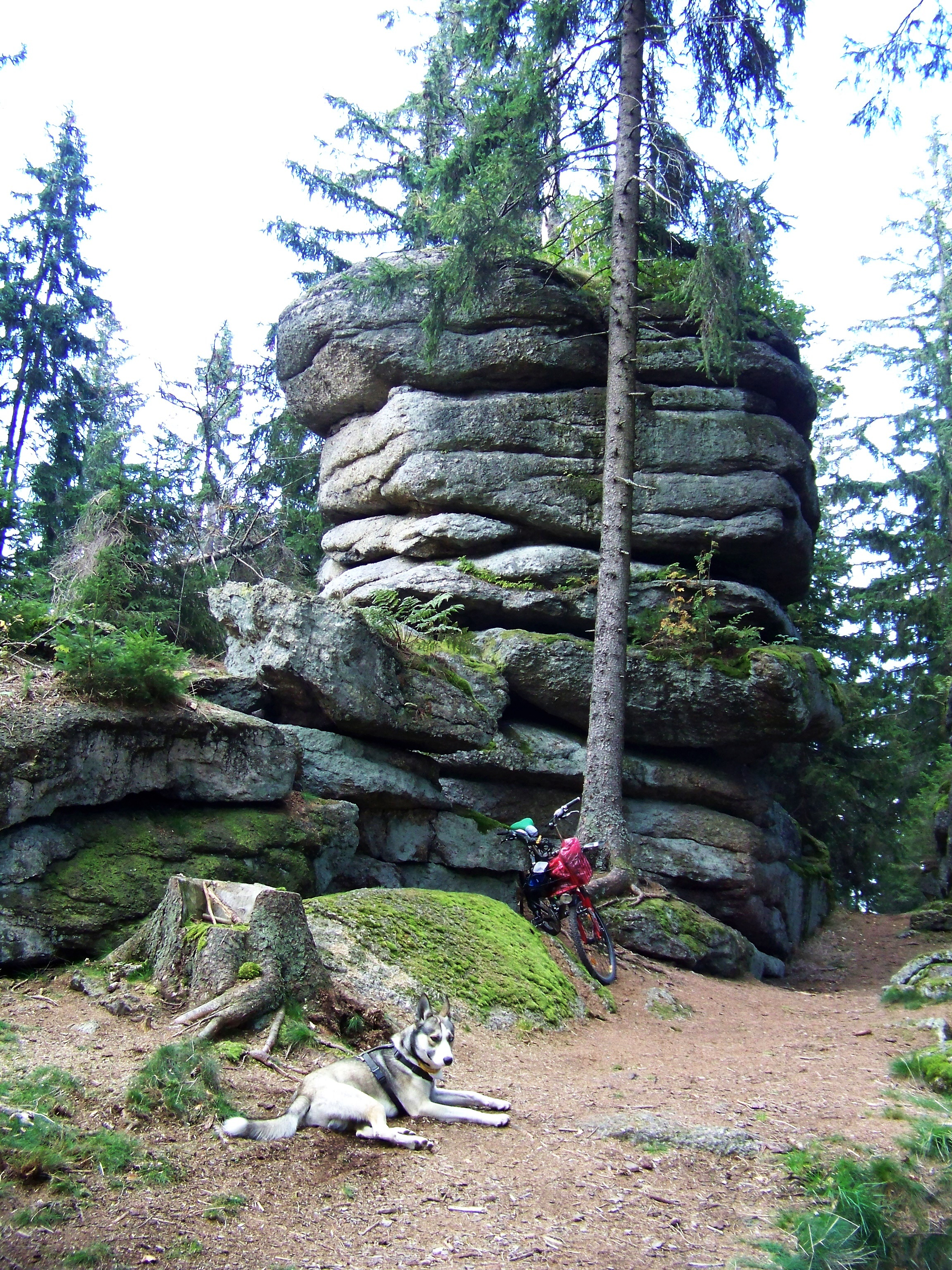 Vrchol hory Kamenec v Novohradských horách leží v nadmořské výšce 1072 m.n.m.